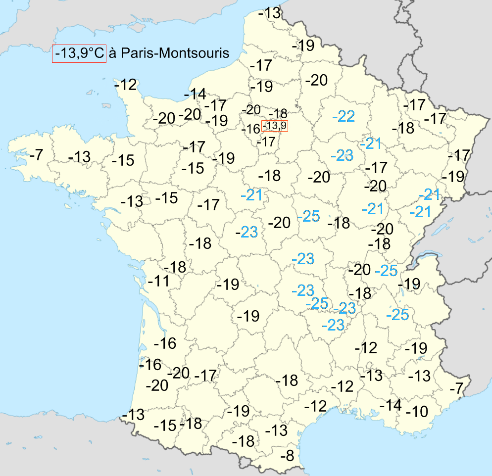 Température minimale en janvier 1985 en France.